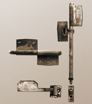 Roto N Drehkippbeschlag